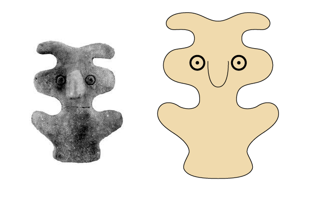 Una reconstrucción de la forma original del idolillo "guatimac" tal y como se muestra en el Museo Arqueológico de Puerto de la Cruz y bocetos contemporáneos.